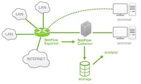 Монгол: Зураг 1 Нэтфлов